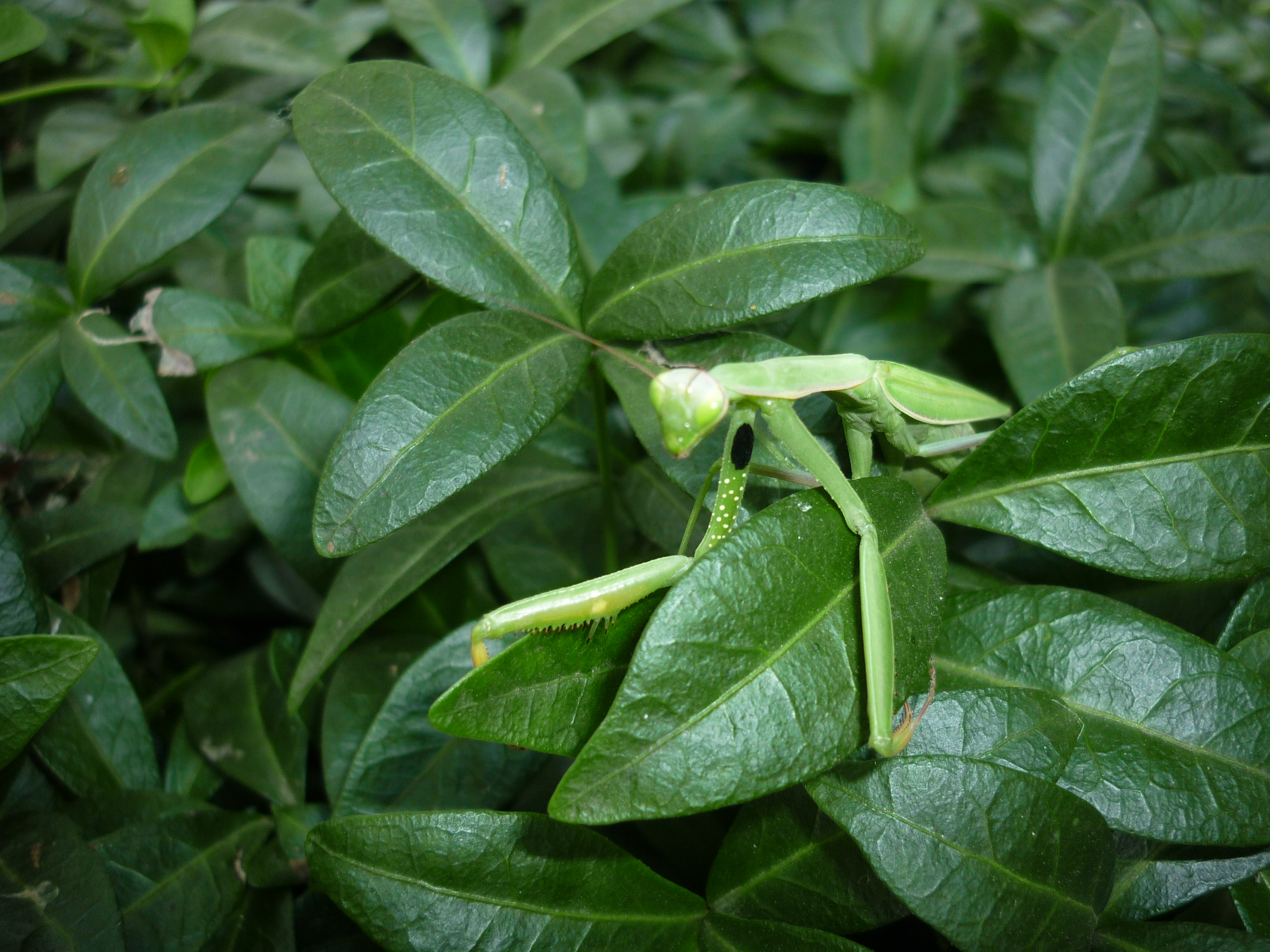 Богомол Mantis religiosa (село Головківка, Чигиринський район, Черкаська область, Україна)